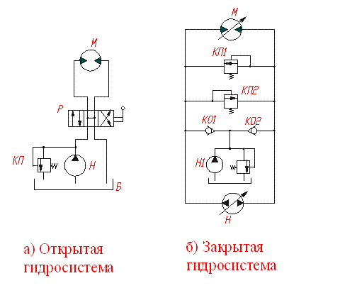 Открытая и закрытая гидросистемы